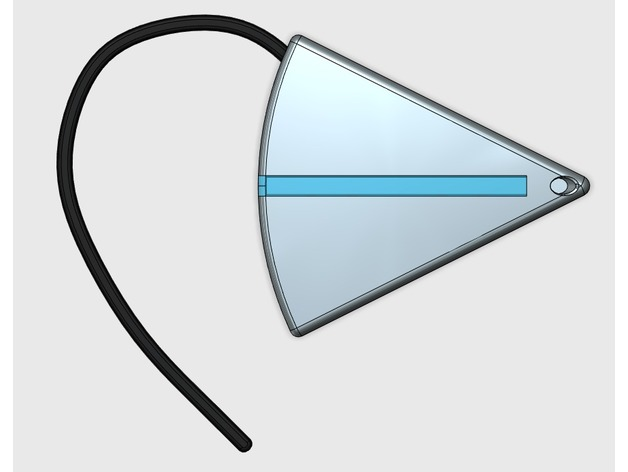 En el mundo de Horizon, los jugadores disponen de un Foco, un dispositivo neuronal de realidad virtual con funciones múltiples. Este dispositivo muestra una interfaz 3D virtual visible solo para el usuario, que le permite comunicarse con otras personas a larga distancia y escanear el entorno, proporcionando información adicional sobre las máquinas y otros objetos.